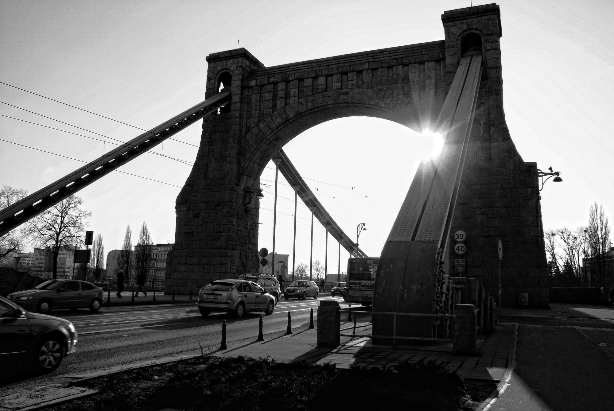 Wrocław, Most Grunwaldzki, 1907